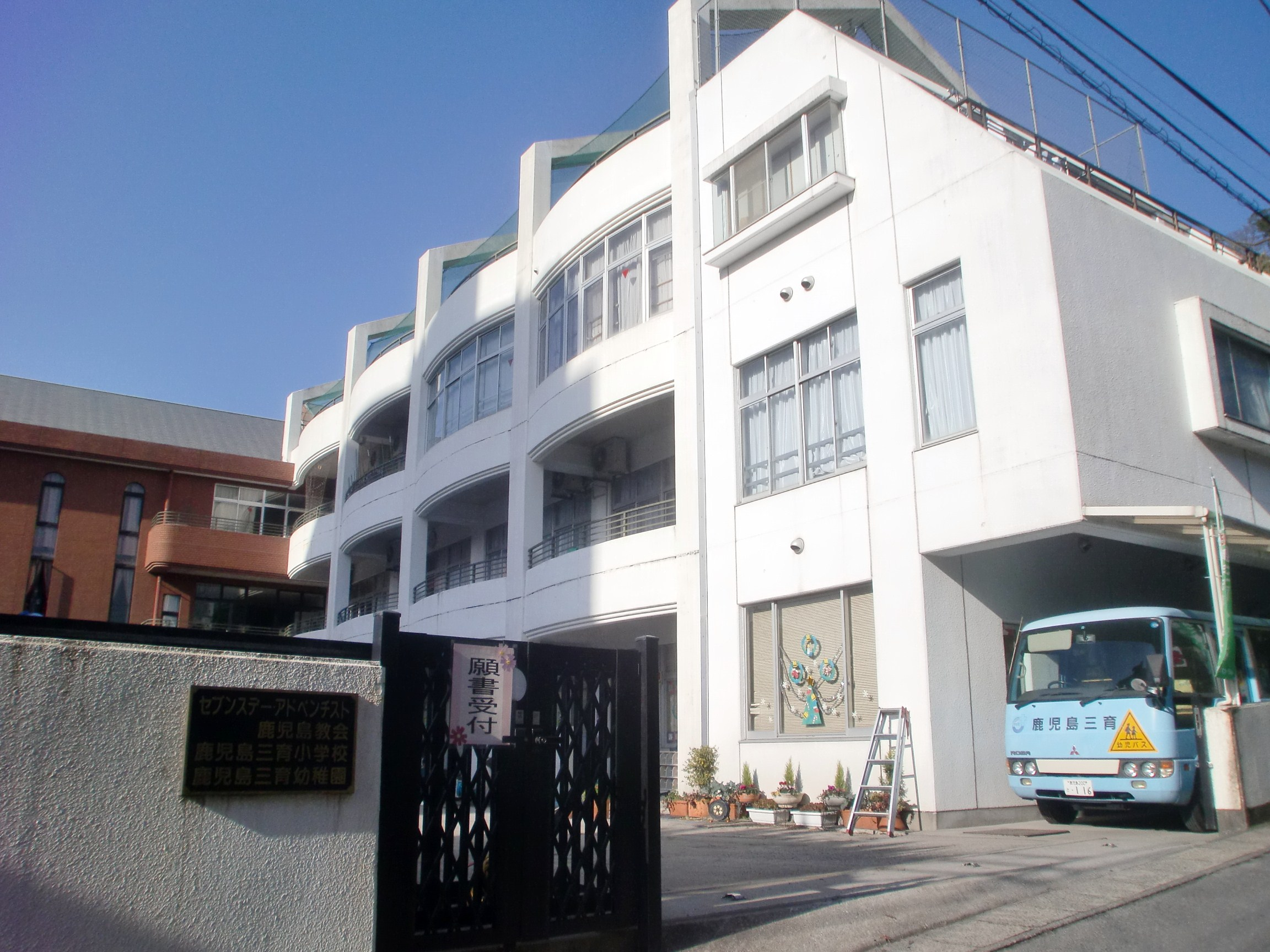 鹿児島三育小学校・幼稚園の外観。